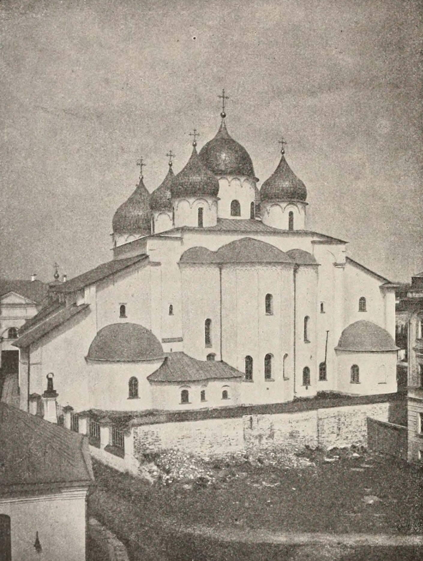 Софийский собор (Новгород). XIX век